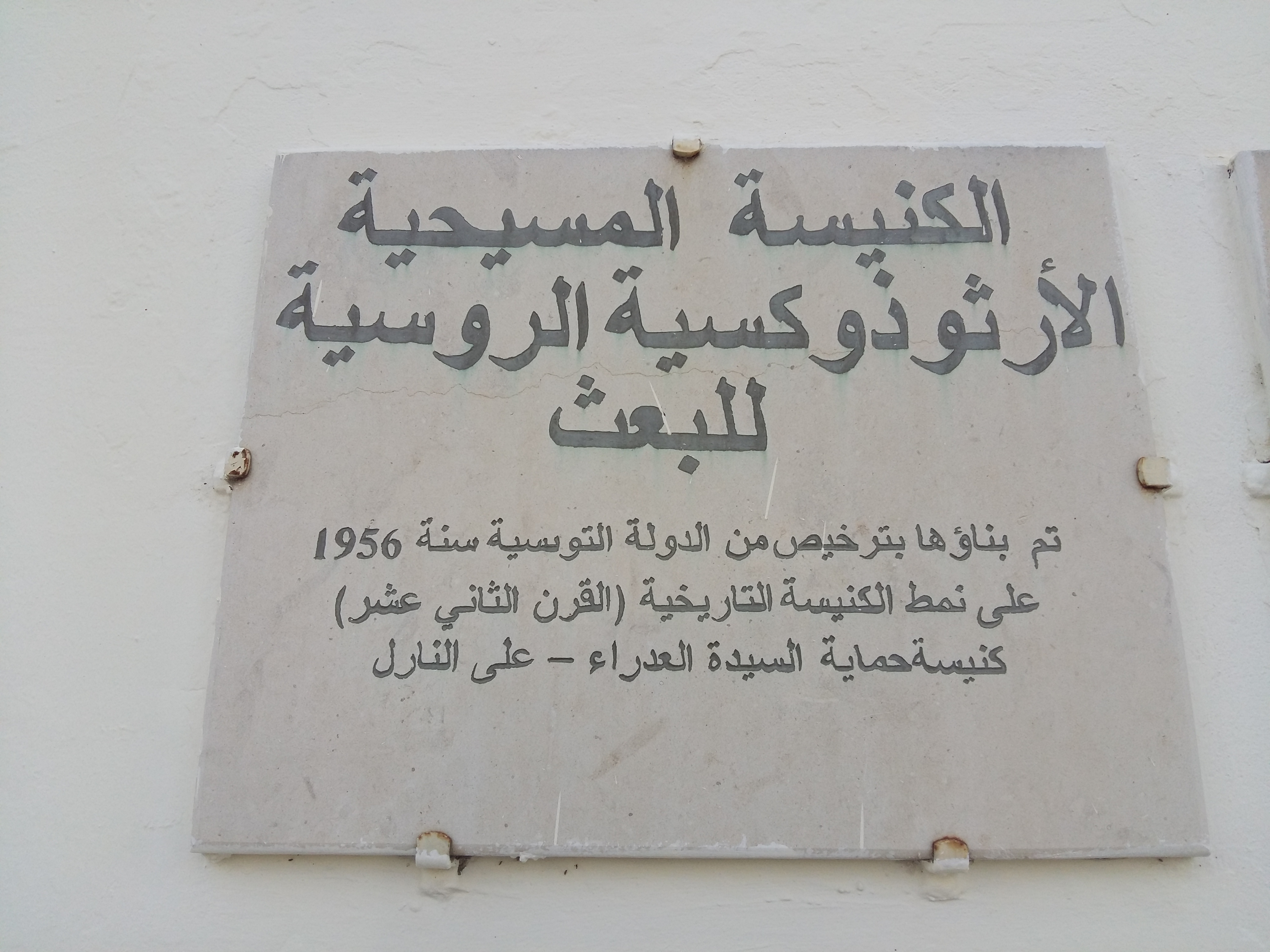 Tunis Eglise Russe